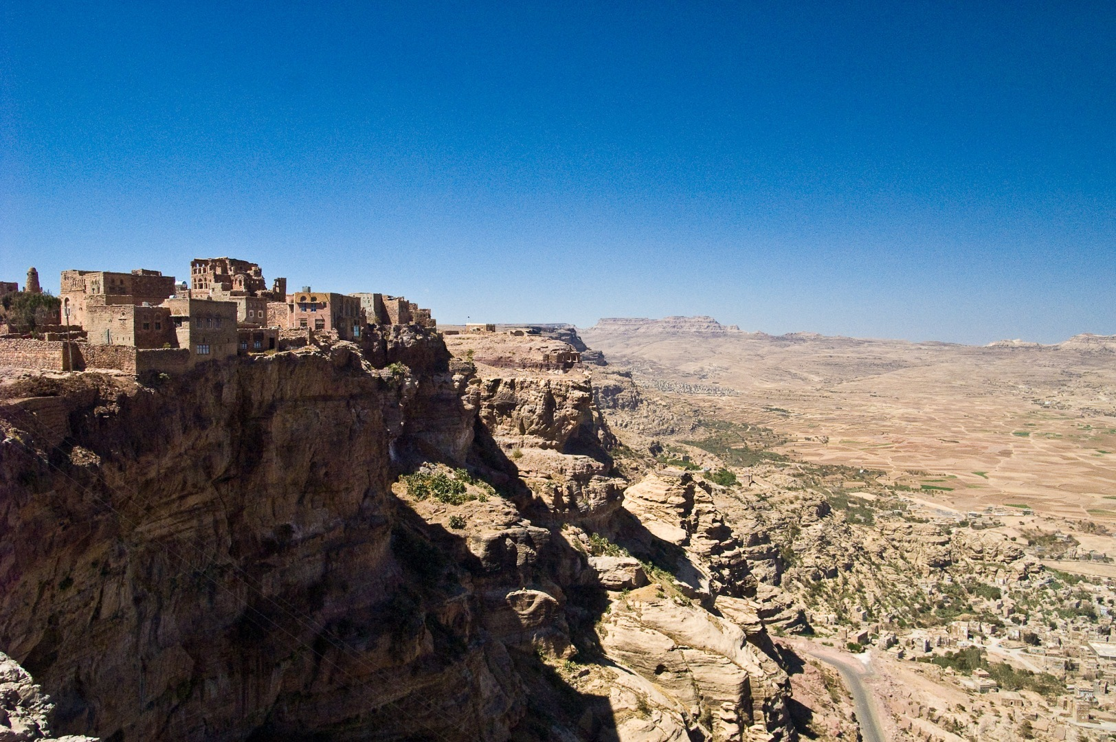 كوكبان (اليمن)